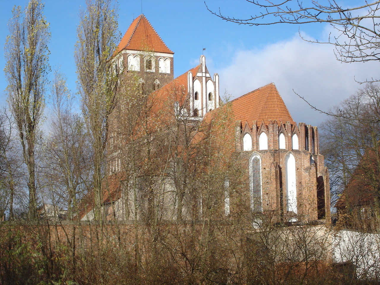 Nowe Miasto Lubawskie, kościół par. p.w. św. Tomasza, pocz. XIV